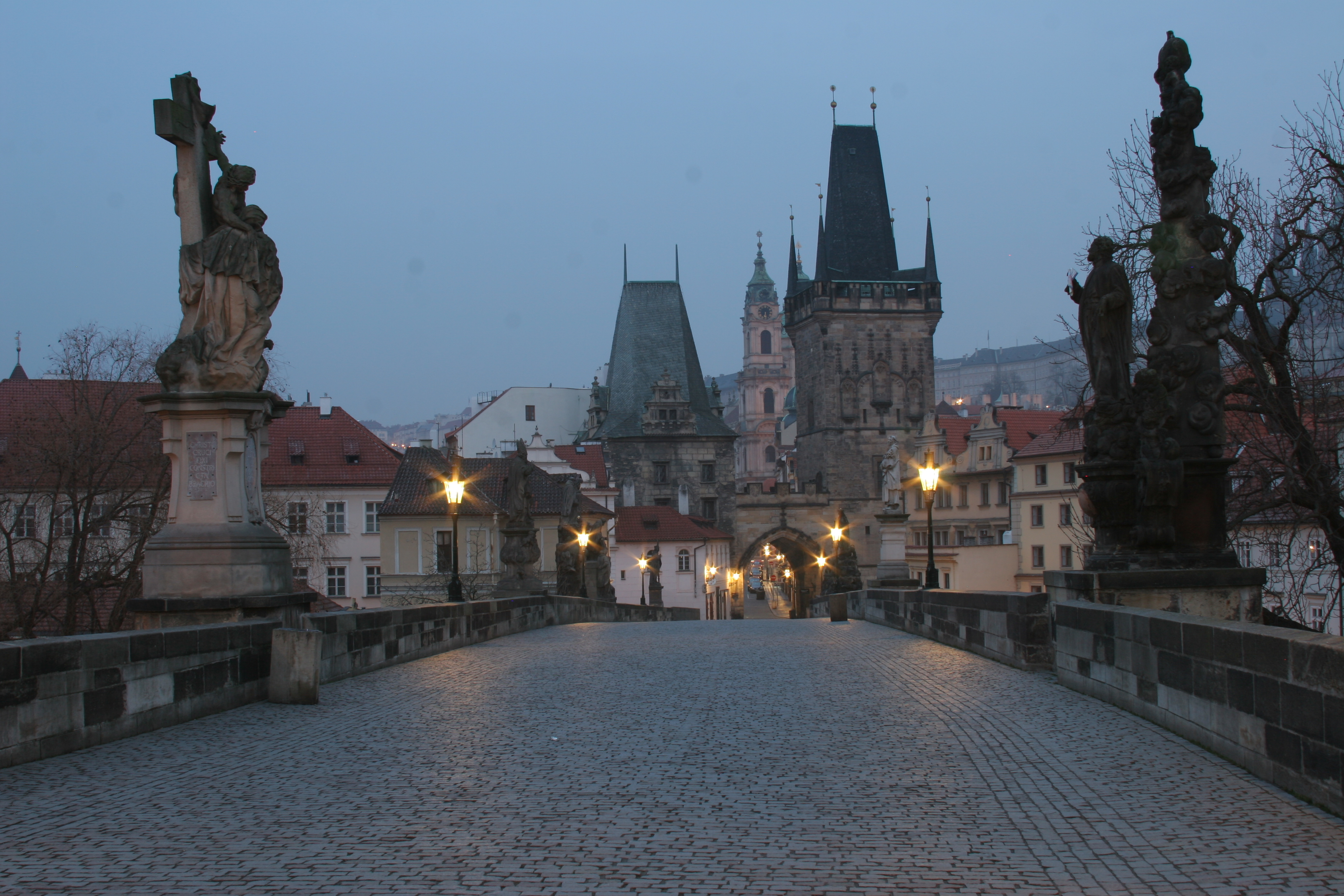 Pohled z Karlova Mostu